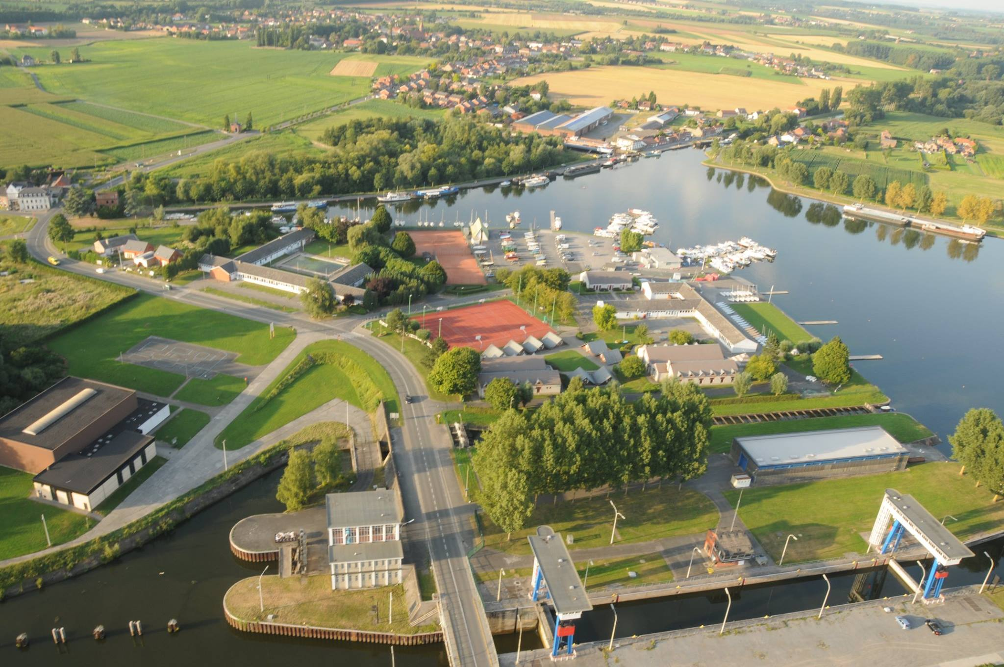 Grand-Large et Adeps